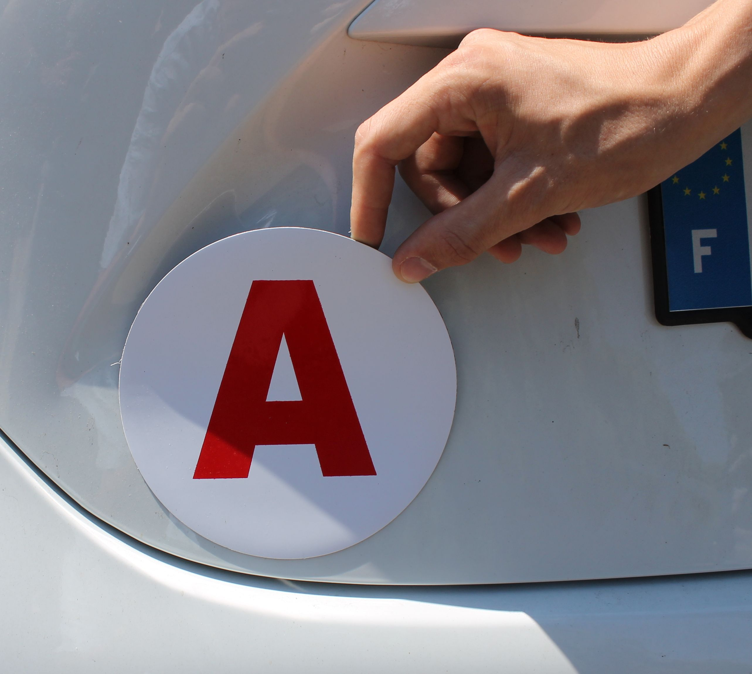 A (apprenti) magnetique